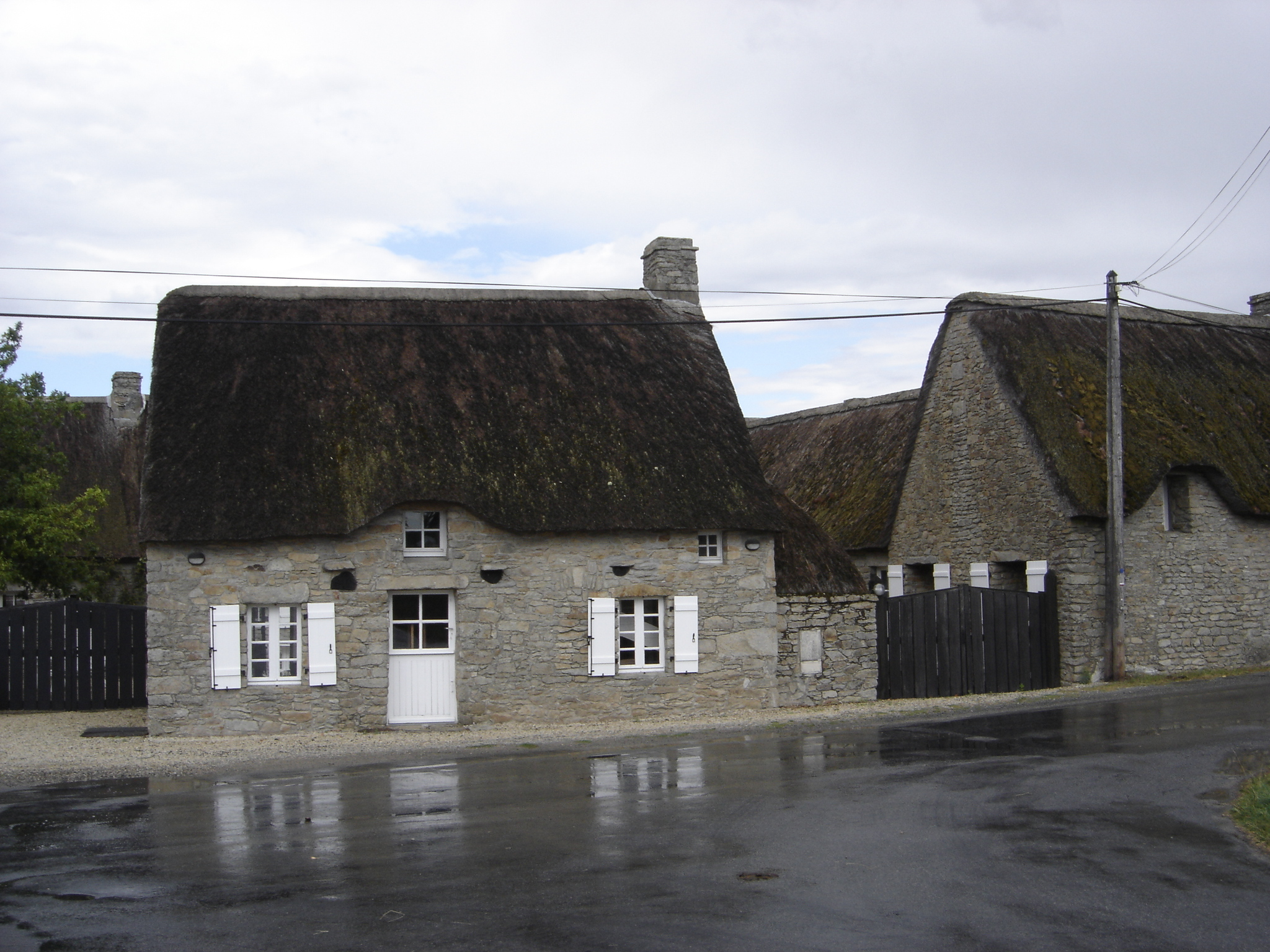 Chaumière à Ker-Hinet en Brière (Loire-Atlantique, France)